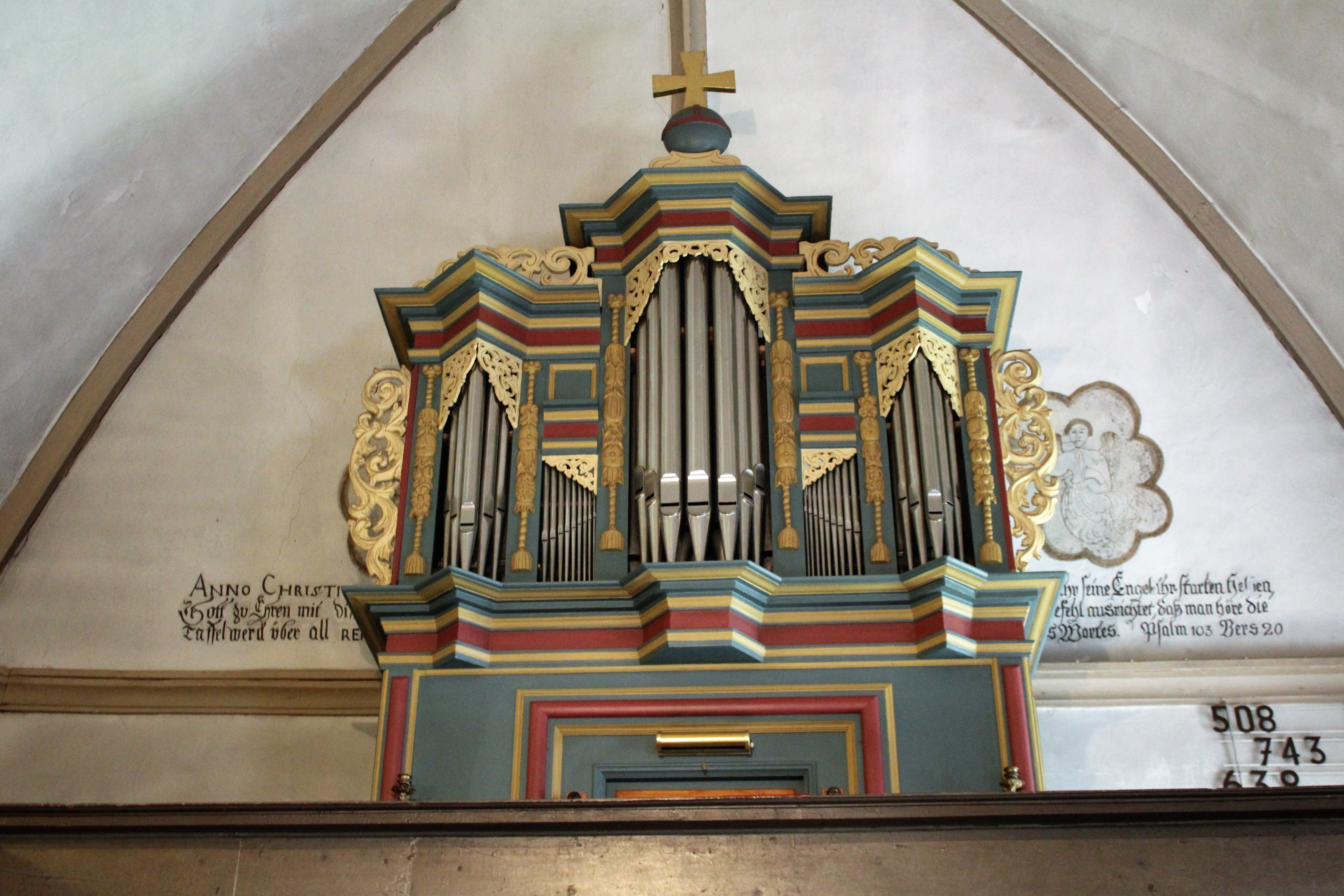 Evanglische Kirche Rodenhausen, Gemeinde Lohra, Landkreis Marburg-Biedenkopf, Hessen, Deutschland